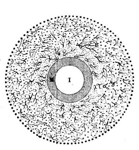 Die drei Spären der Erde von Rene Descartes